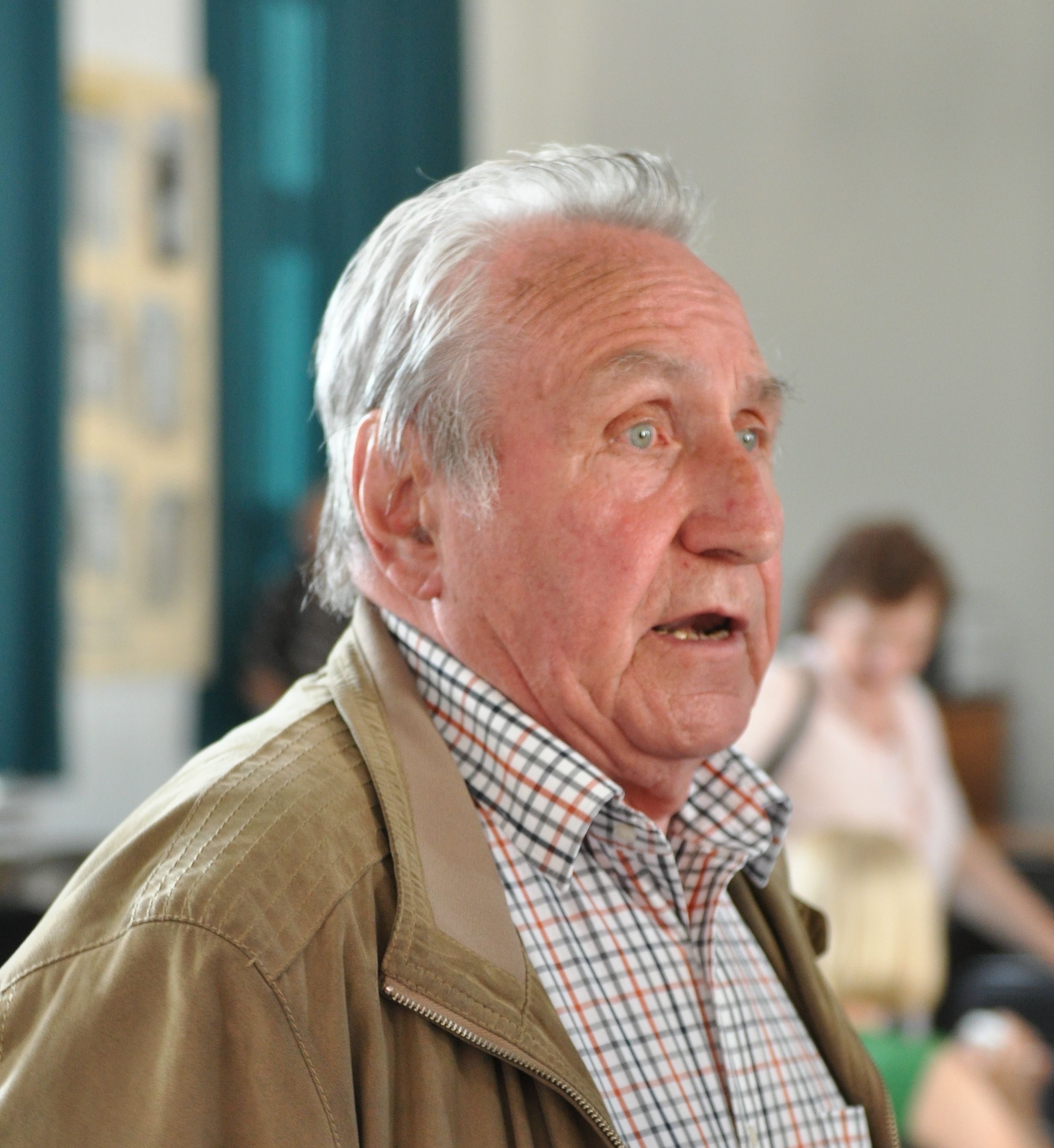 Der ehemalige Bürgermeister Heinz Schemken (CDU)